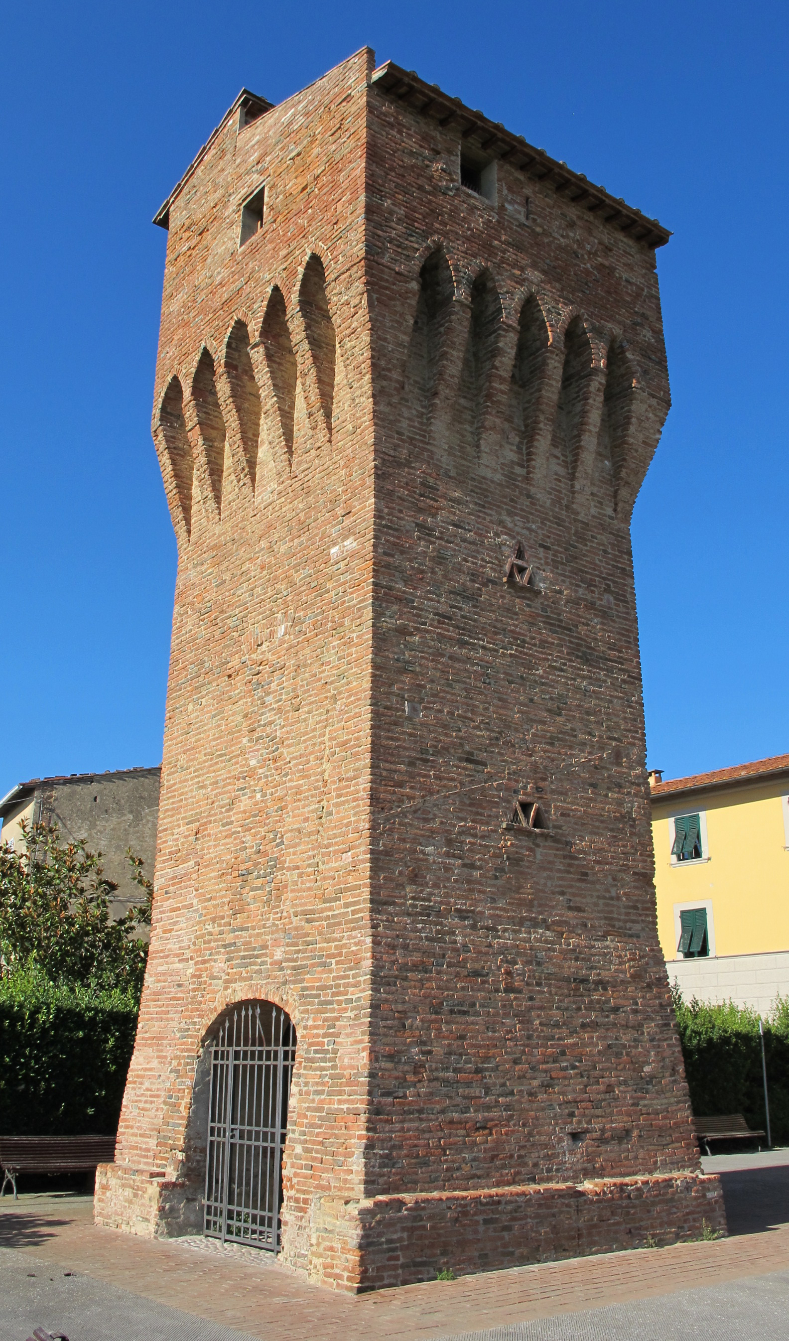 Montopoli v.a., torre di san matteo